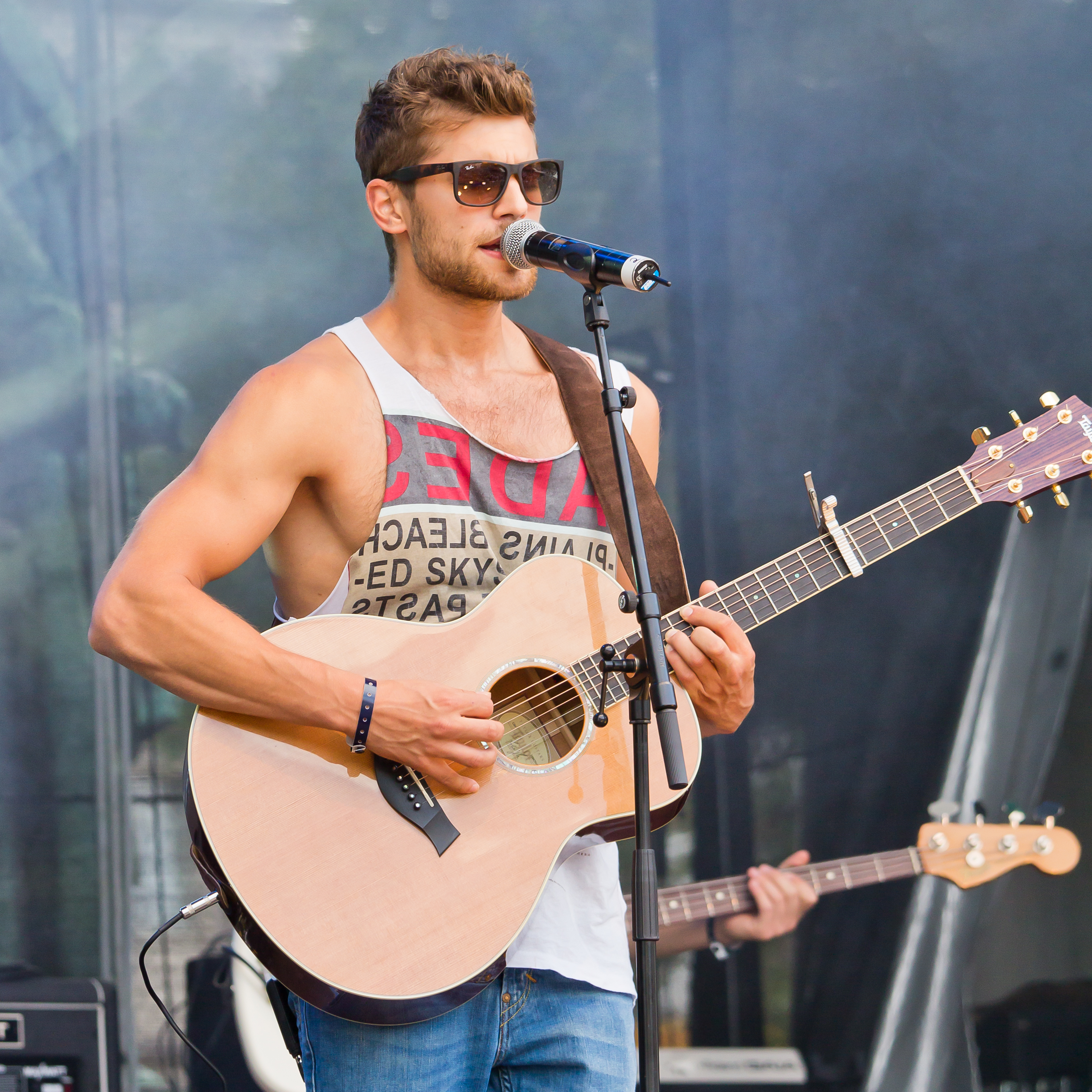 Fabian Buch auf der Hauptbühne auf dem Heumarkt des CSD Straßenfestes Köln 2012